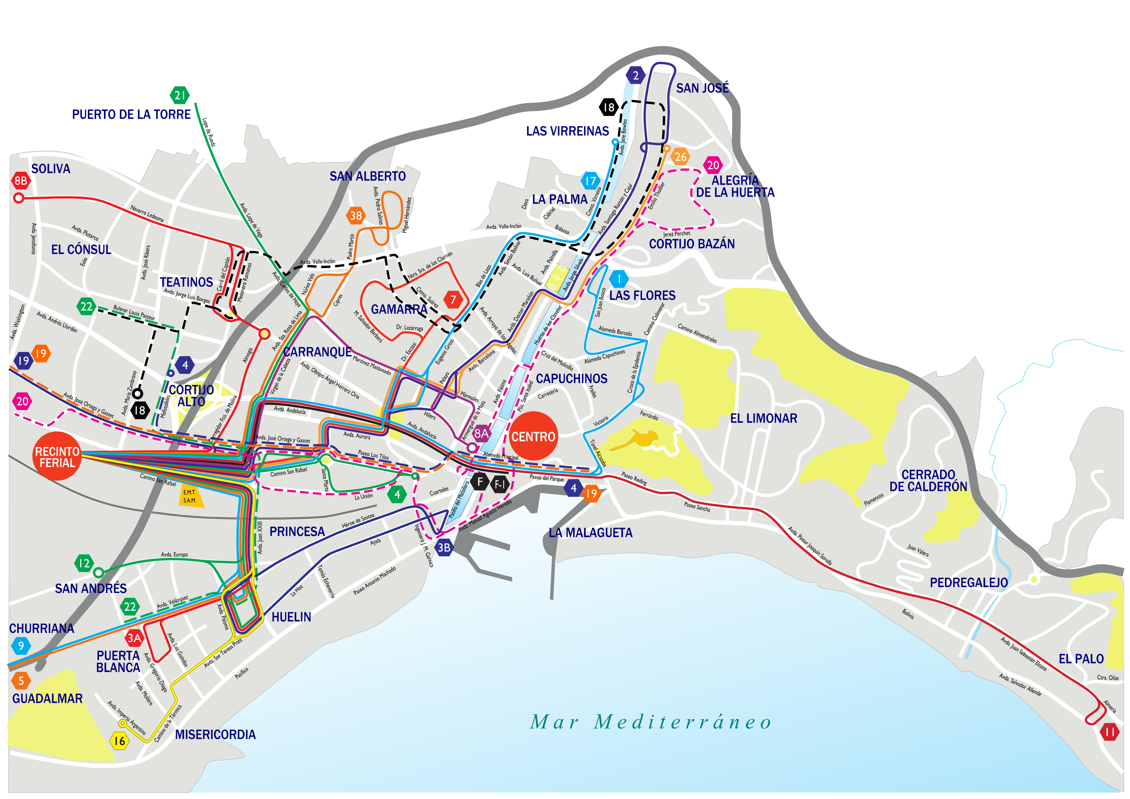 Plano de la Red de autobuses urbanos de Málaga con destino a la Feria. Año 2008.